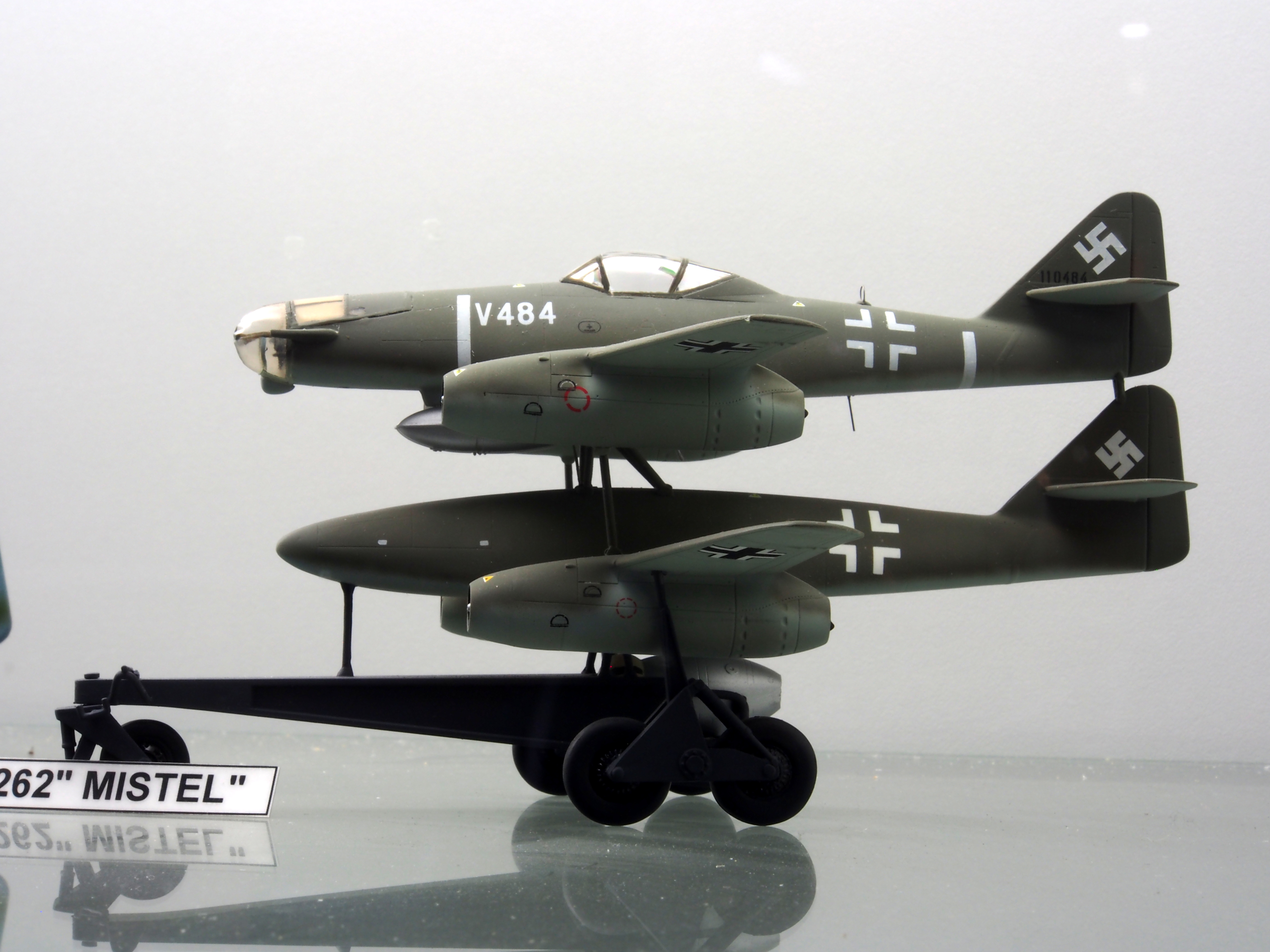 Messerschmitt Me 262 MISTEL